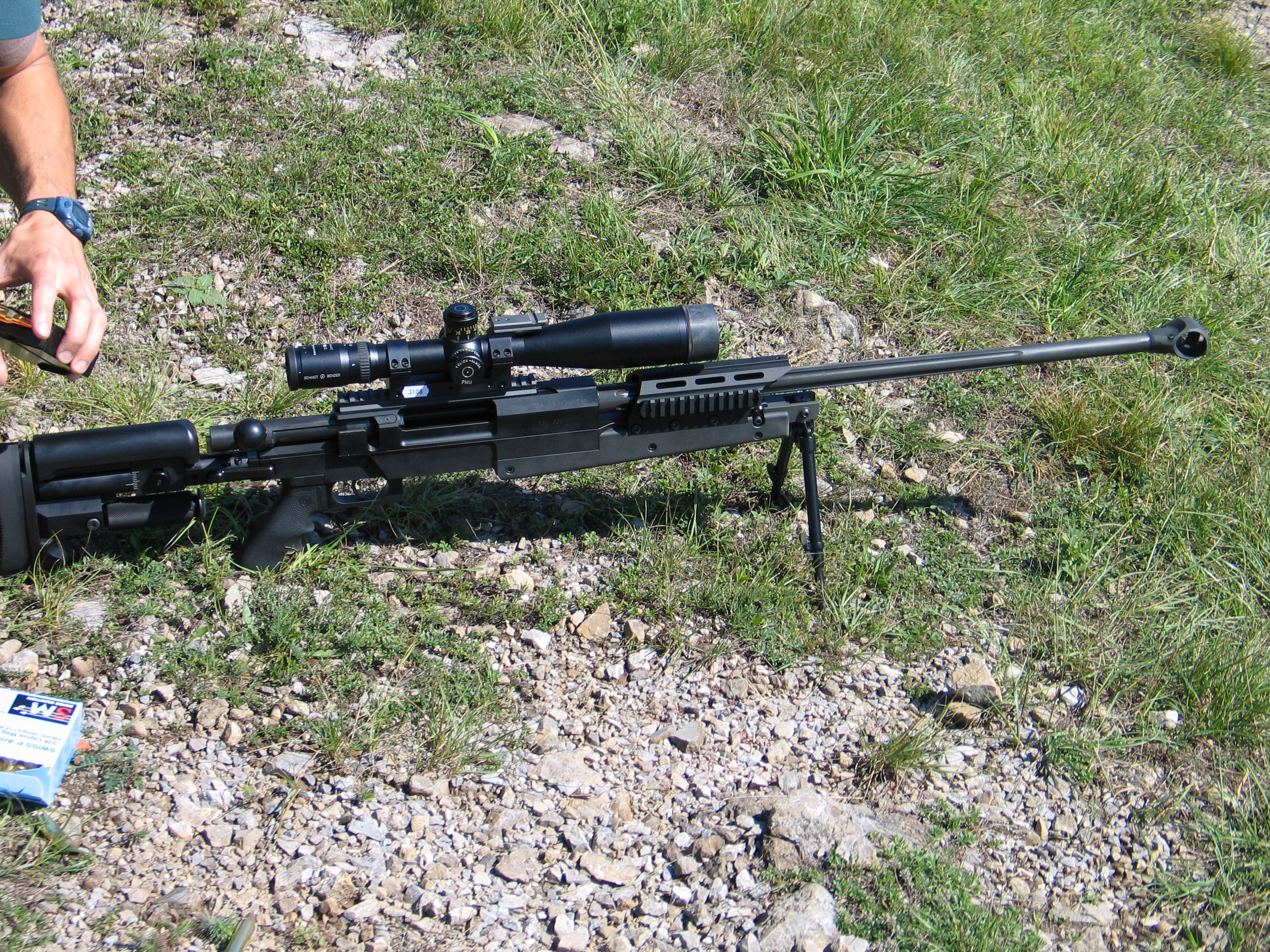 Mini Hecate .338 Lapua Magnum sniper rifle